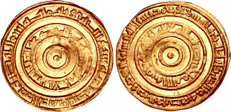 Dinar de ouro do califa fatímida Alaziz Bilá cunhado na Palestina (Filastine) em 976-977